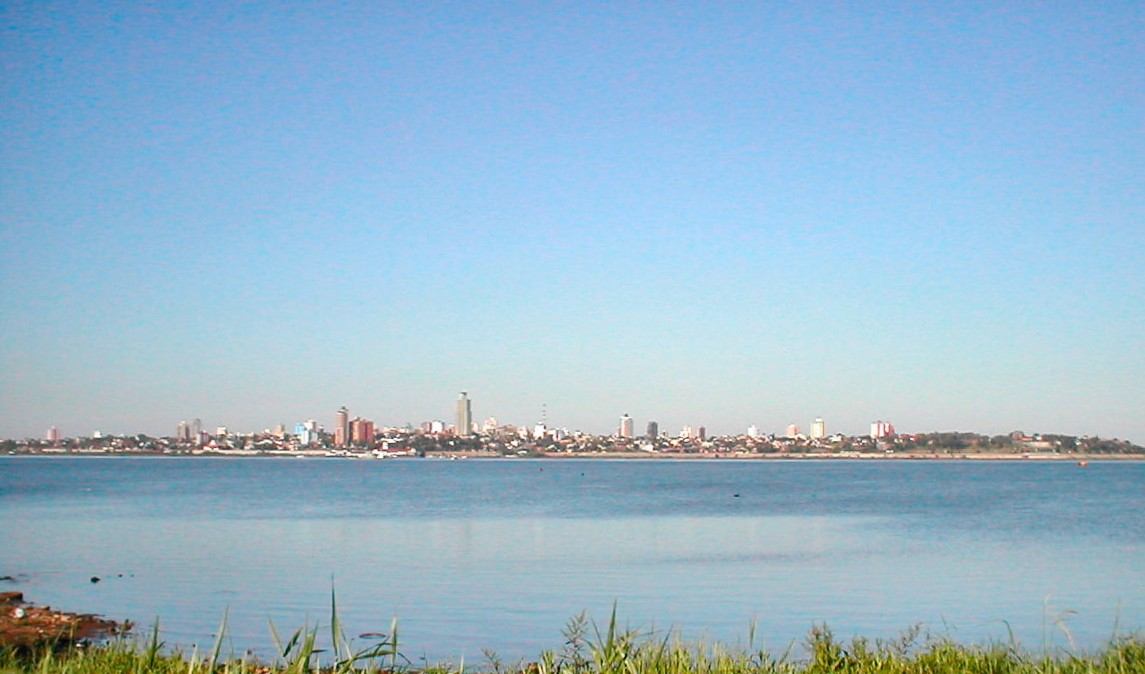 Posadas